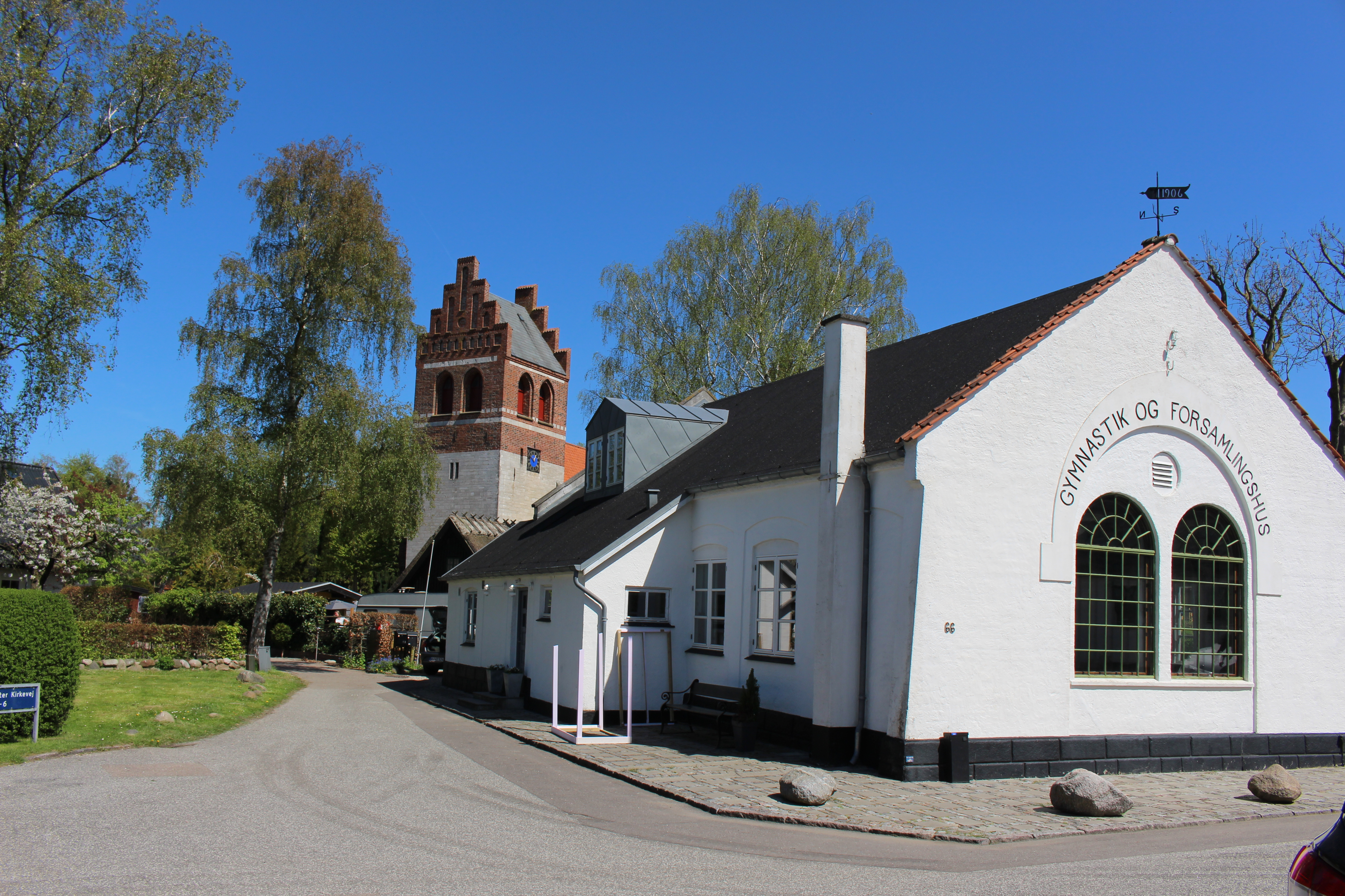 Herstedvester landsby